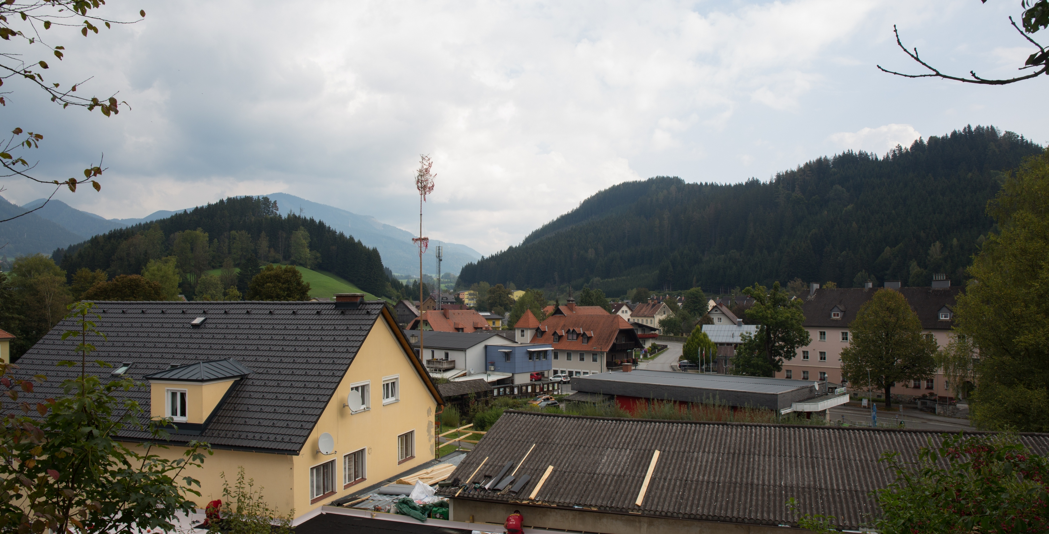 Thörl, Steiermark, Austria